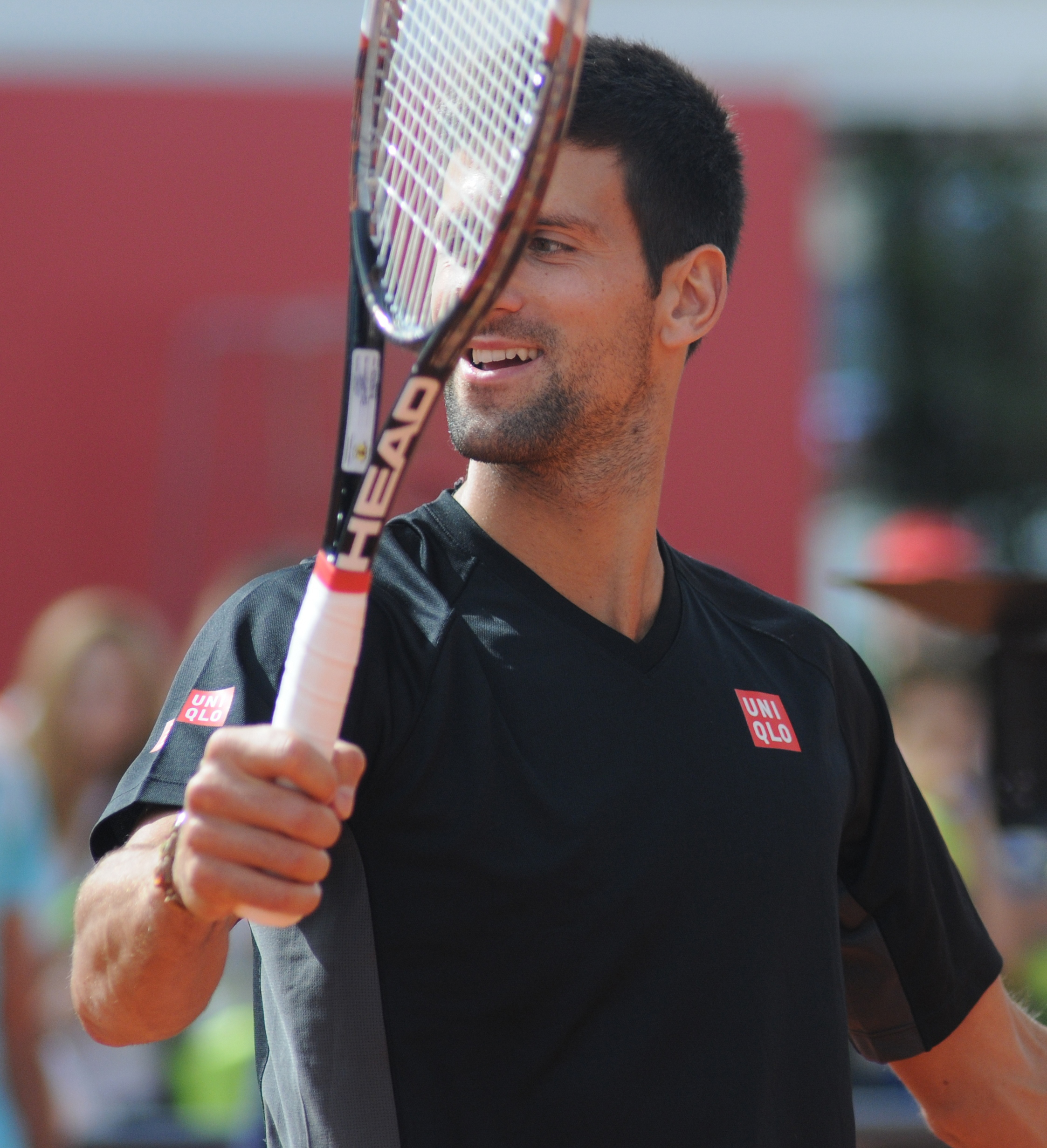 Novak Đoković at the 2014 Internazionali BNL d'Italia